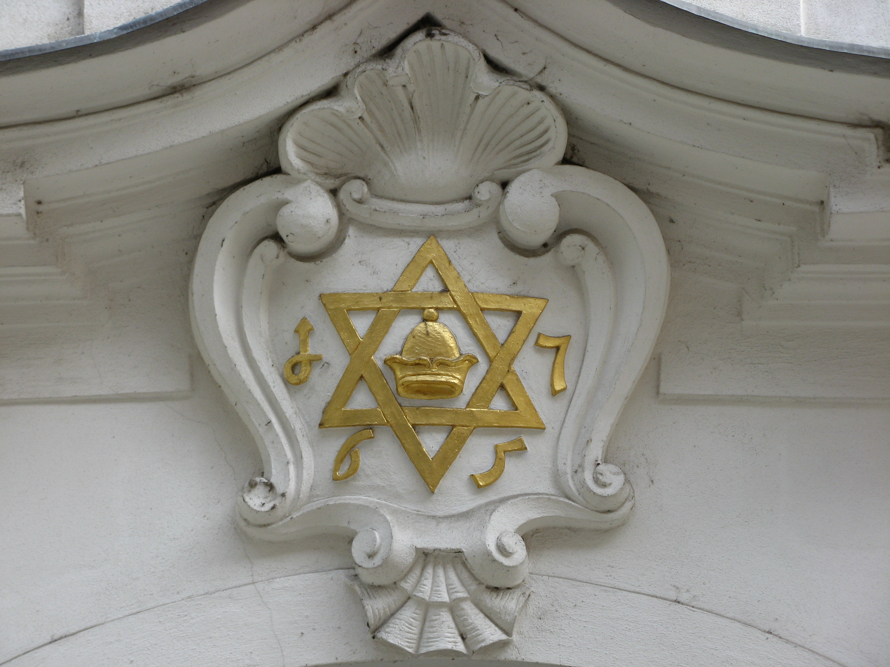 Detail am Jüdischen Rathaus in Prag